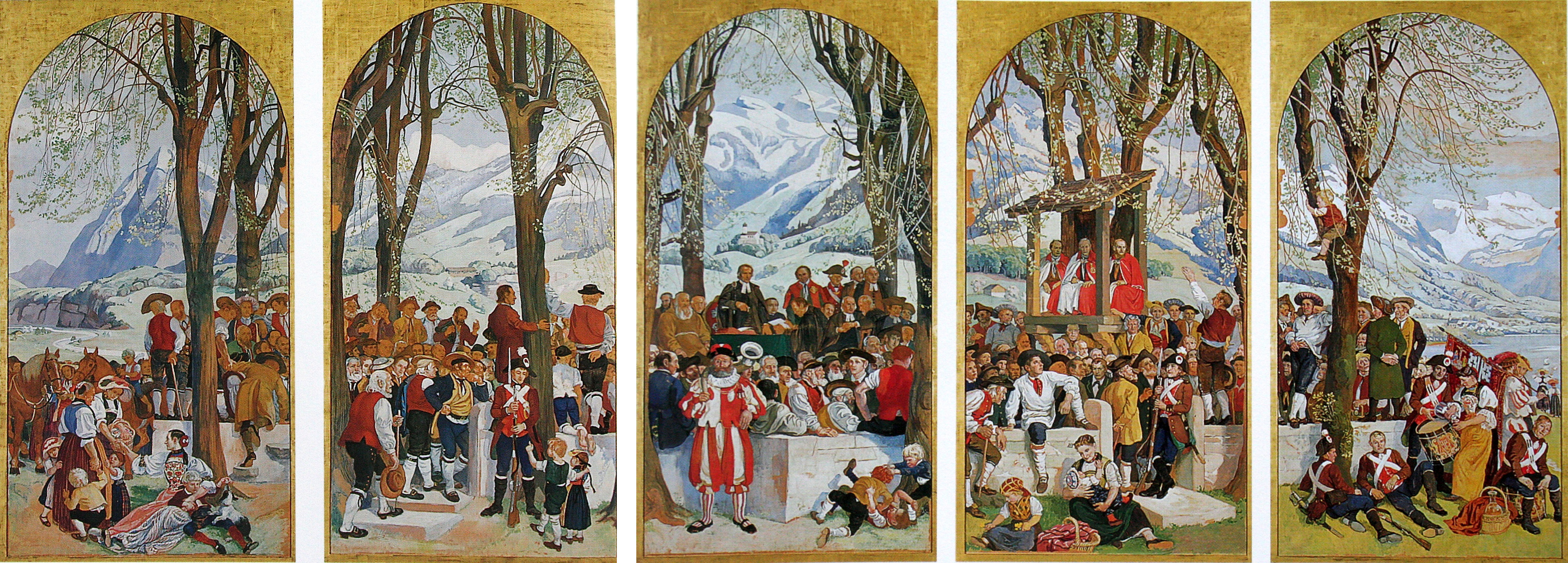 Die Landsgemeinde, Gemälde von Albert Welti (1862-1912), 1910/12, fünf Felder, je 273 x 144 cm, Guache auf Papier auf Leinwand, Kunsthaus Zürich, Eigentum der Schweizerischen Eidgenossenschaft. Das Original befindet sich im Ständeratssaal in Bern.